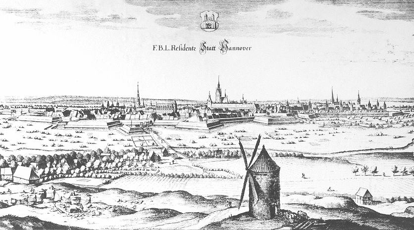 im Vordergrund der Lindener Turm als Windmühle auf dem Lindener Berg, signiert: Casp. Merian fecit.